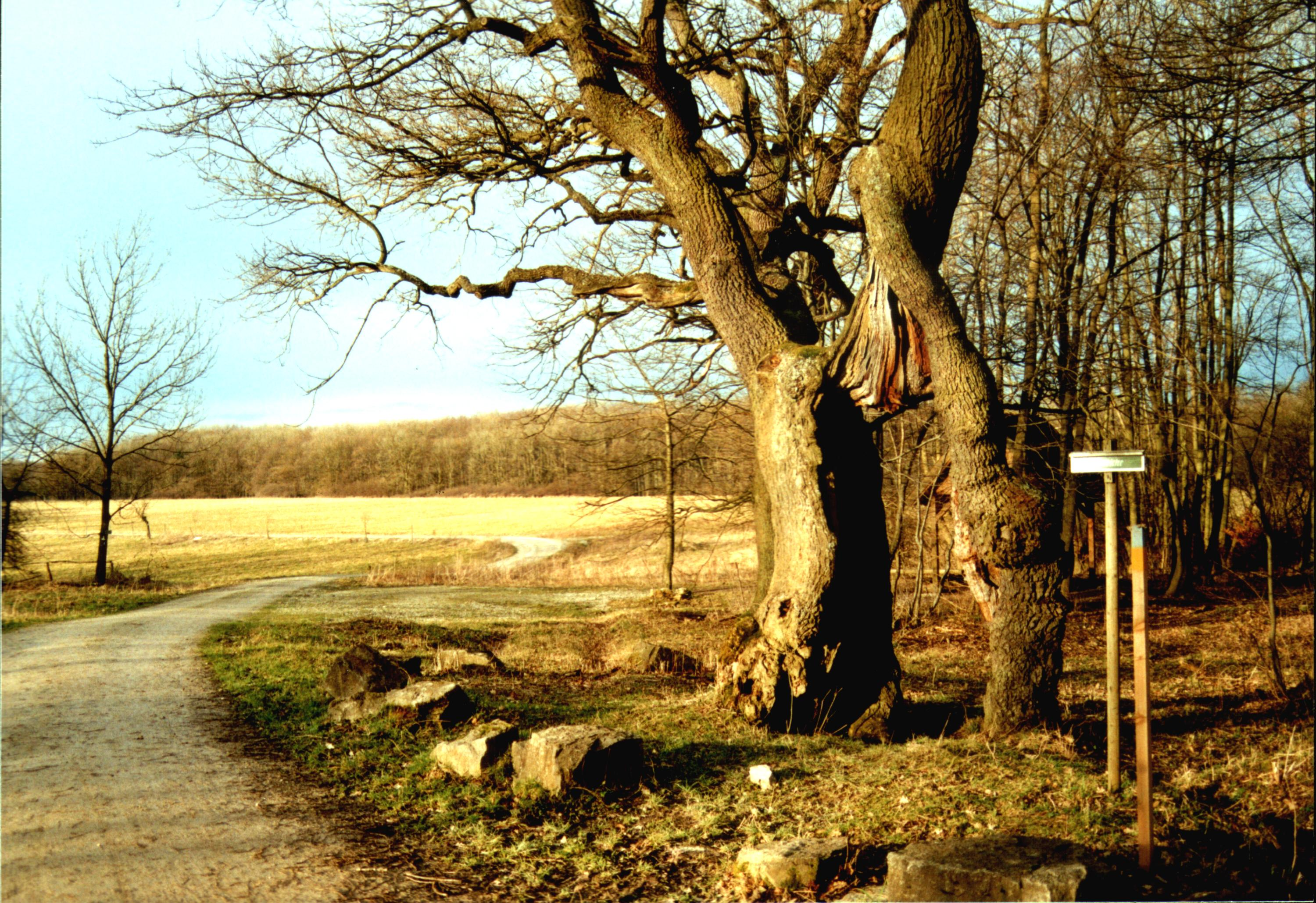 Der Rennstieg mit Ihlefeld im Hintergrund und der Betteleiche (rechts, mit Durchlass im Stamm).